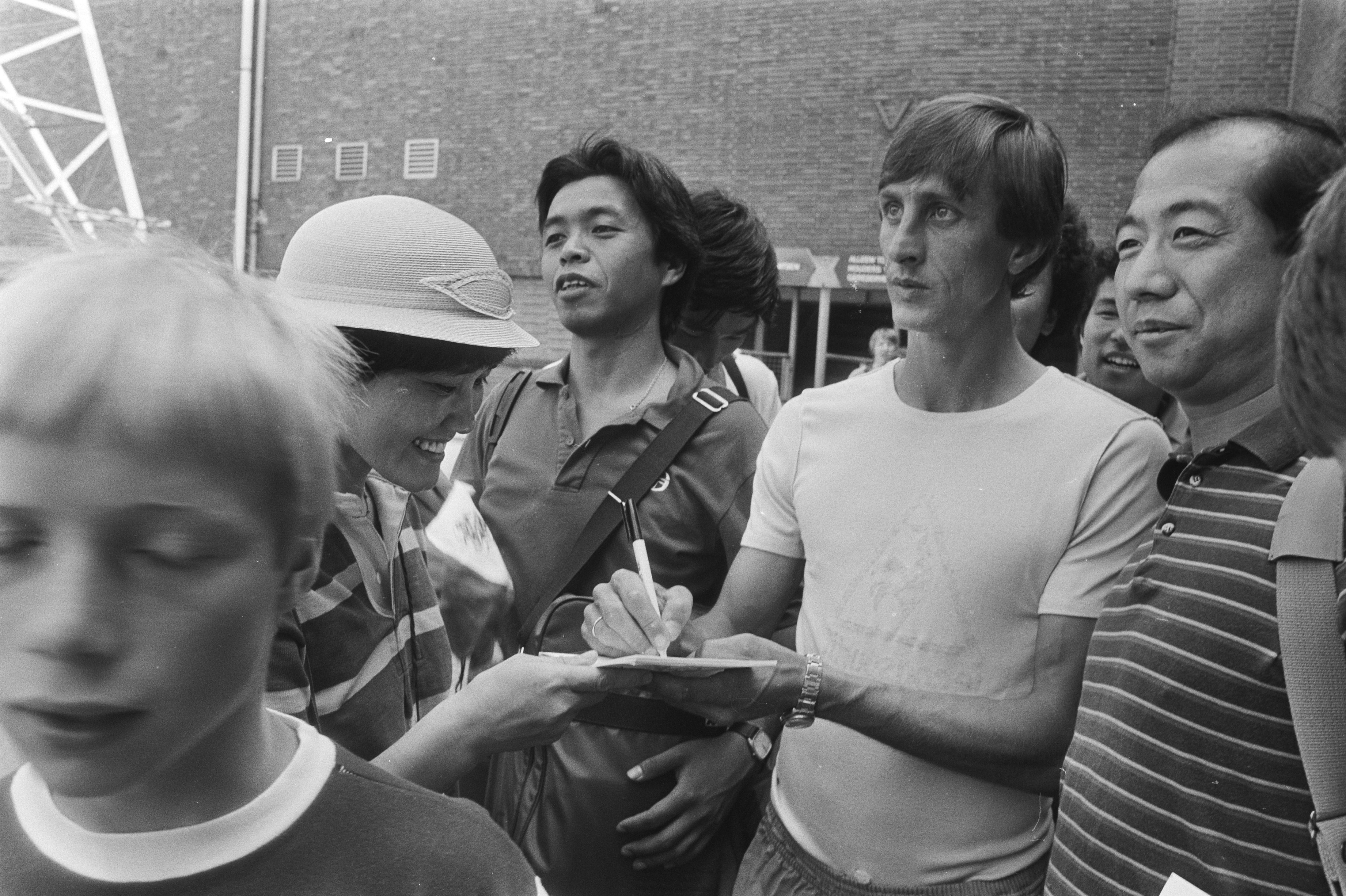 Nationaal Archief Beschrijving: Japanse voetbalfans met Johan Cruijff (na training Ajax) Datum: 13 juli 1982 Vervaardiger: Anefo / Bogaerts Bestanddeelnummer: 932-2446 URL: [1] Voor meer informatie over het Nationaal Archief: Voor meer foto's uit deze en andere collecties, bezoek onze Beeldbank:, U kunt ons helpen onze kennis van de fotocollecties te verrijken door tags en commentaren toe te voegen. Herkent u mensen of locaties of heeft u een bijzonder verhaal te vertellen bij één van de foto's, laat dan een reactie achter (als u ingelogd bent bij Flickr) of stuur een mailtje naar